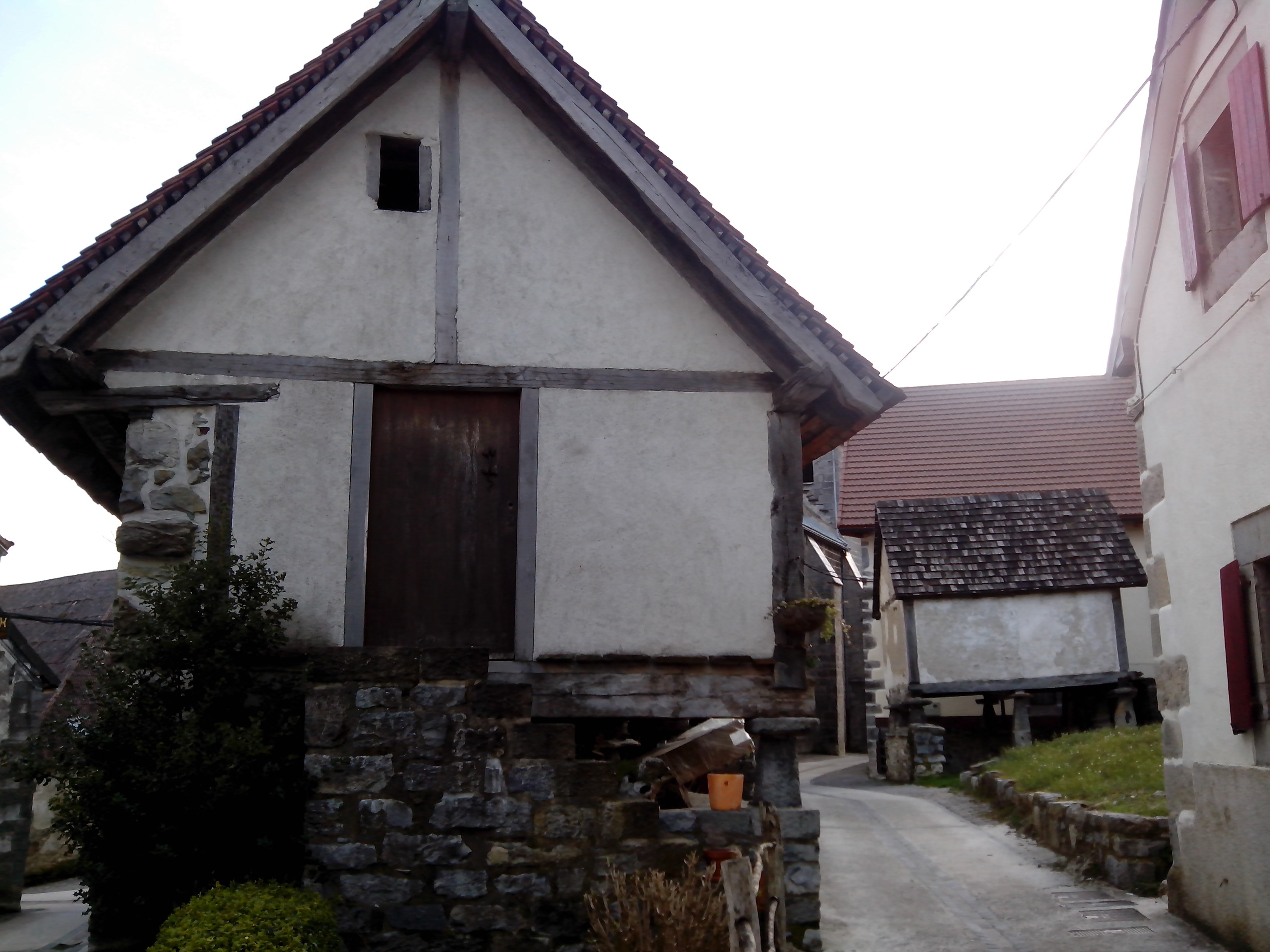 Hórreos de Orbaiceta (Navarra).